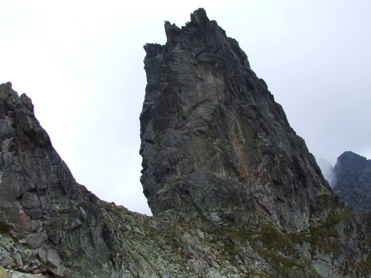 Turnia Spąga obok przełęczy Czerwona Ławka w słowackich Tatrach Wysokich